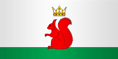 Flaga miasta Brzostowica Wielka